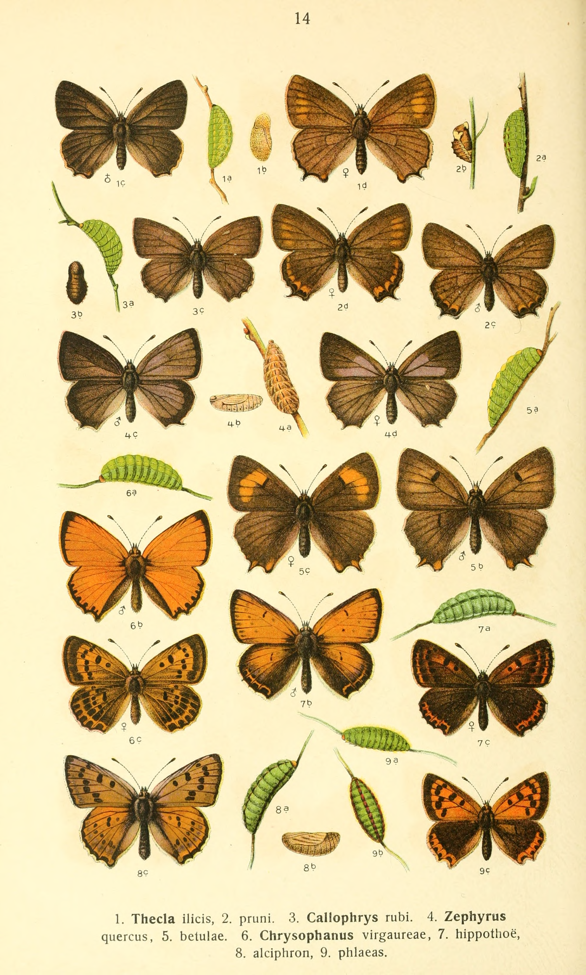 Plate from Die Schmetterlinge Deutschlands mit besonderer Berücksichtigung ihrer Biologie, Bd. 1-4, by K. Eckstein